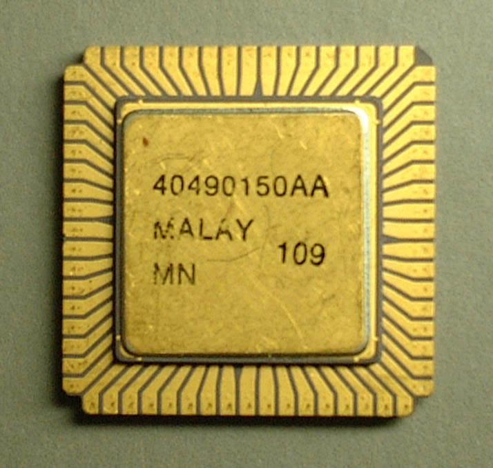 I80186